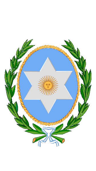 Escudo de Salta